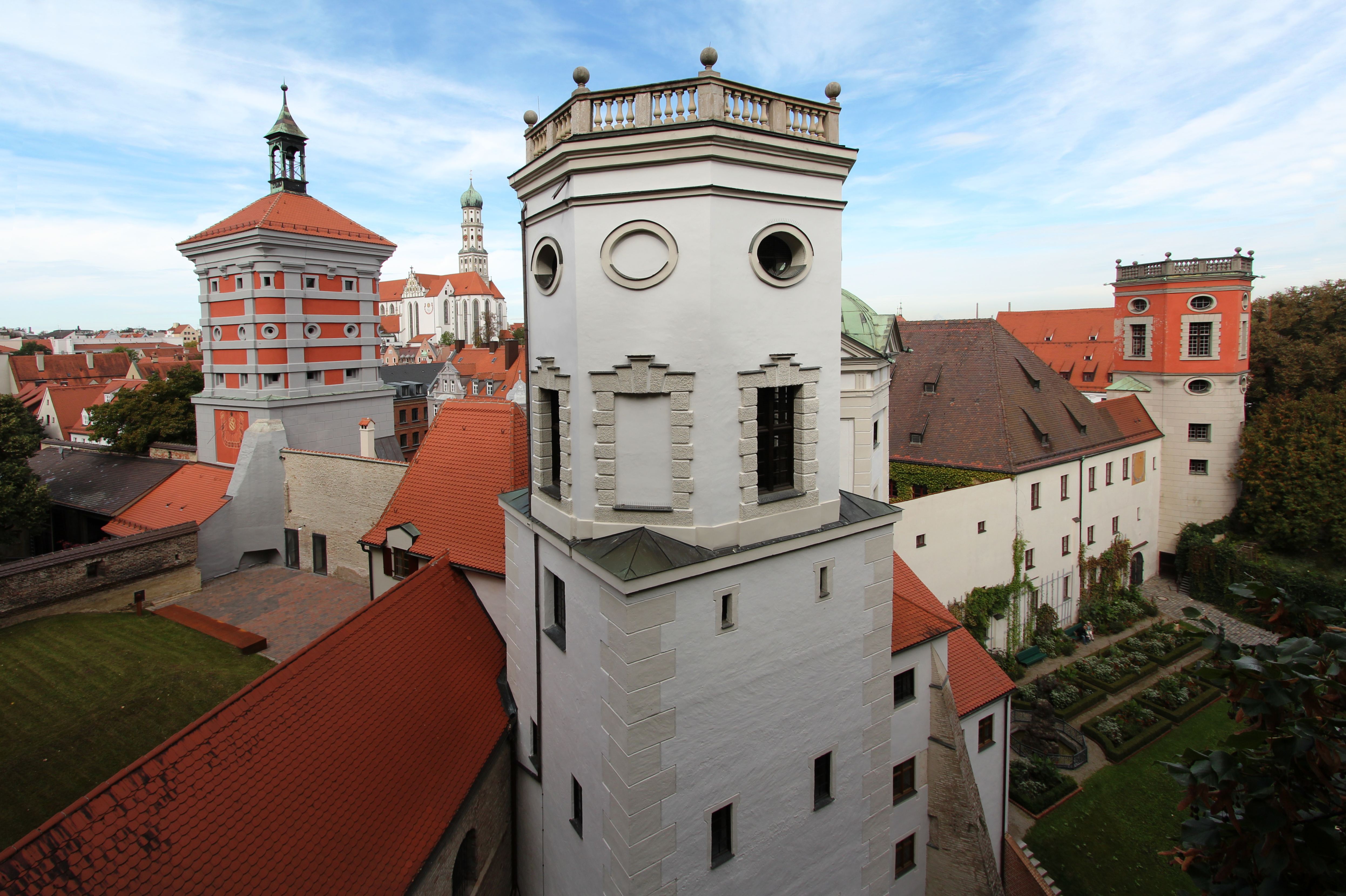 Wassertürme am Roten Tor in Augsburg. Im Vordergrund der Große Wasserturm. Links das Rote Tor, rechts der Kastenturm. Im Hintergrund die Kirche St. Ulrich und St. Afra.